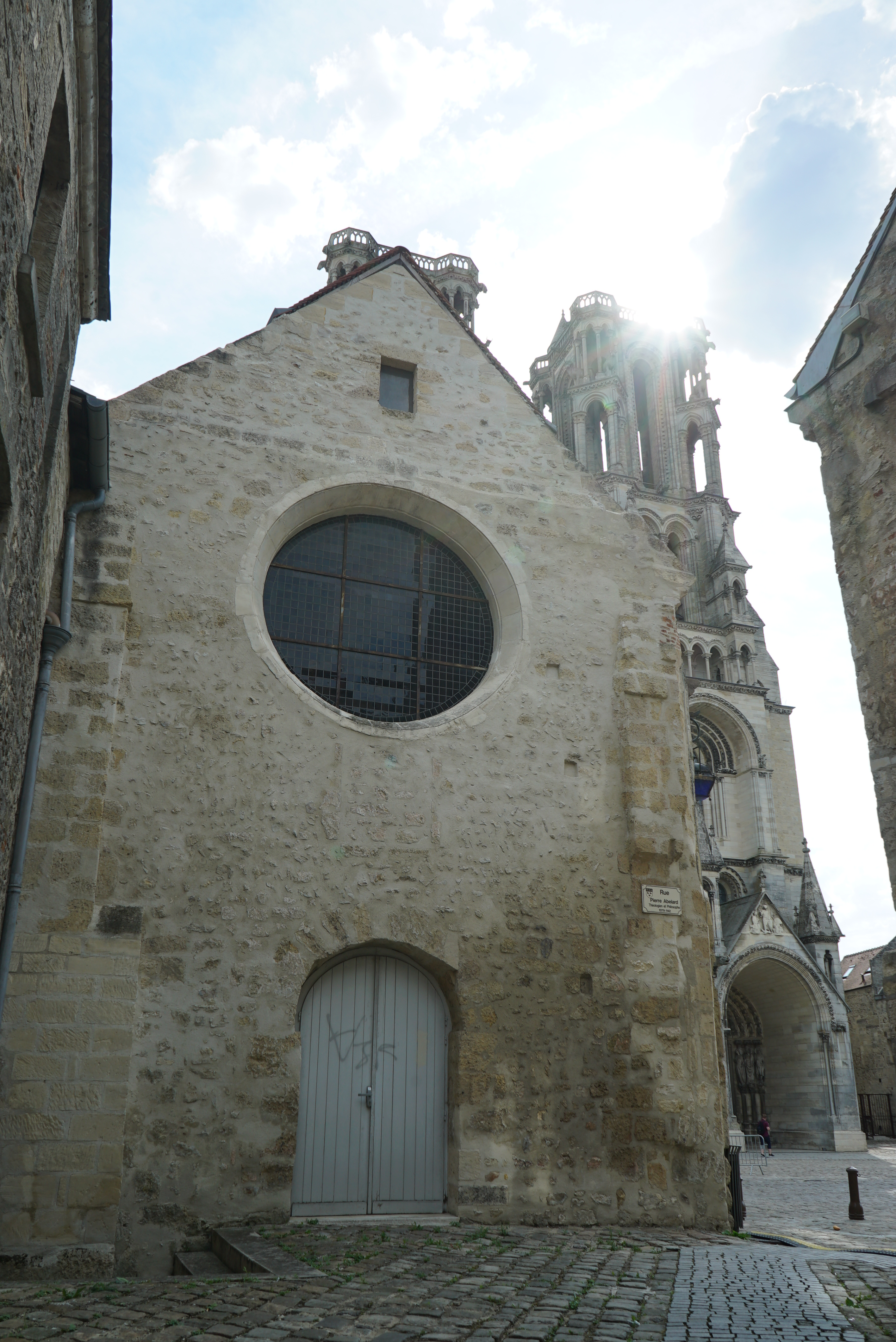 vue de l'Ancienne église St-Martin-au-Parvis à Laon.